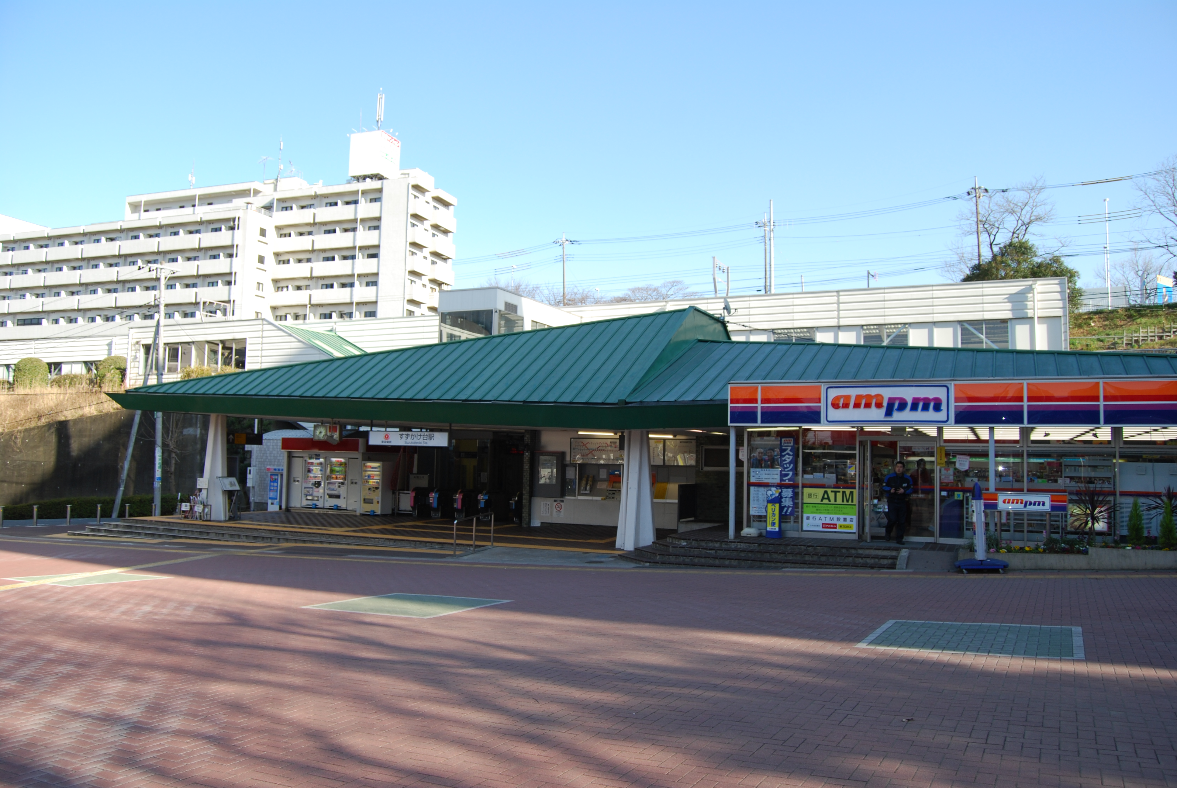 すずかけ台駅 駅前の様子